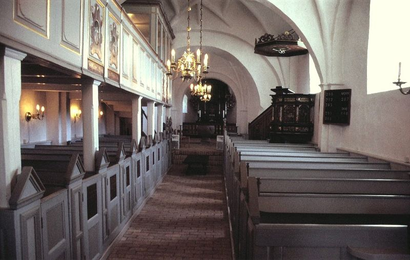 Vester Bølle Kirke i Danmark. Skibet set mod øst med herskabspulpitur mod nord (vestre side)